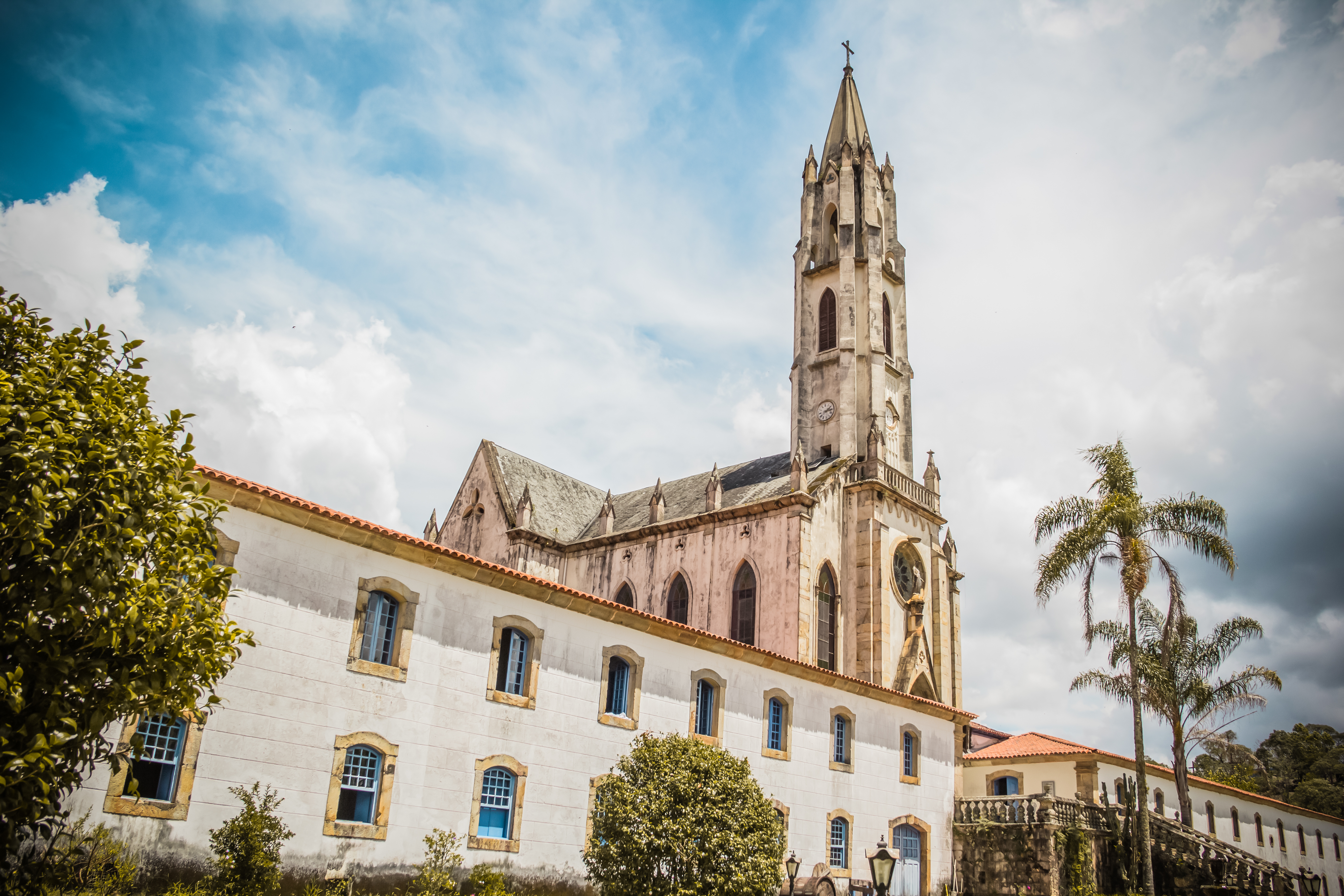 Colégio do Caraça: conjunto arquitetônico e paisagístico